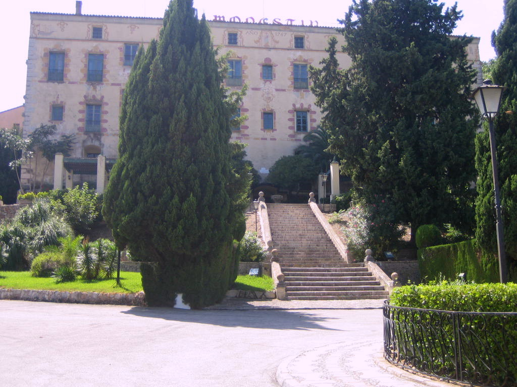 Fachada del Convento de Aguas Vivas, Carcaixent (España)